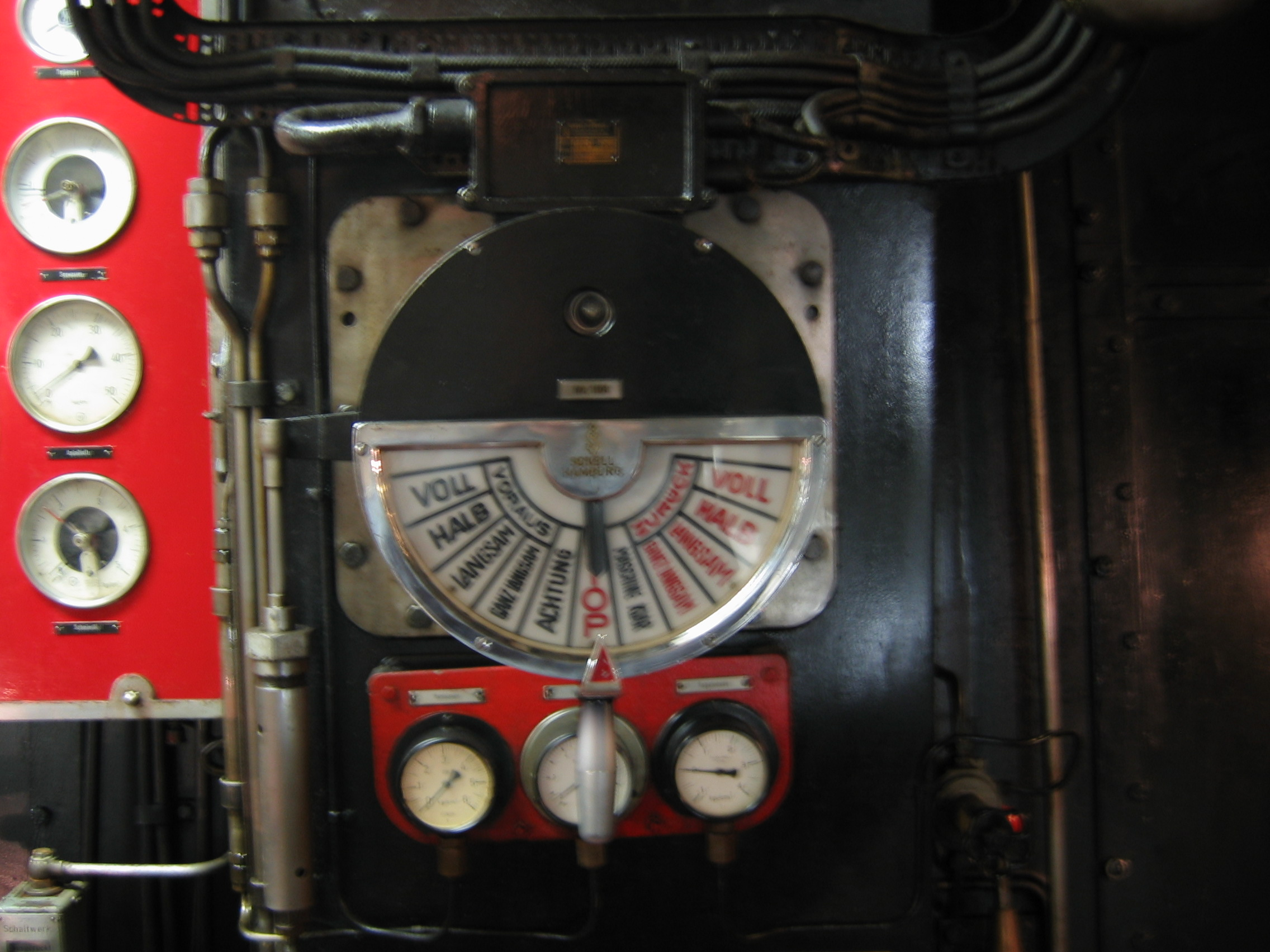 Author =MaciejKa Source =MaciejKa Description = pl: Tarcza telegrafu maszynowego na MS Cap San Diego w pomieszczeniu maszynowni; fragment lokalnego stanowiska sterowania silnikiem głównym statku.